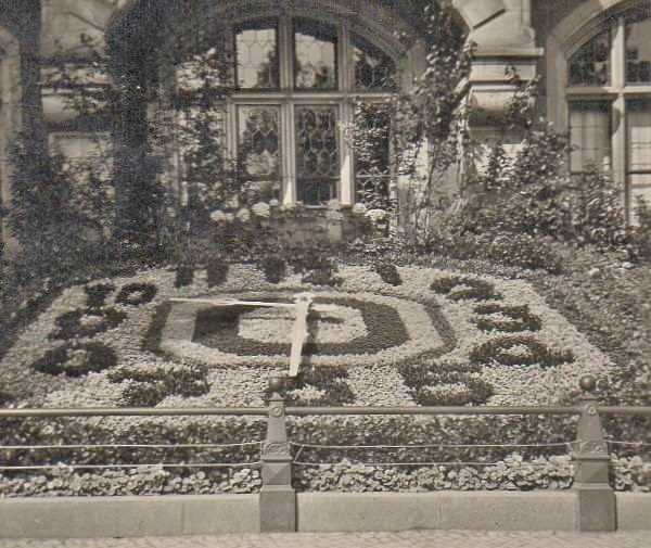 Bernburger Blumenuhr (1938)